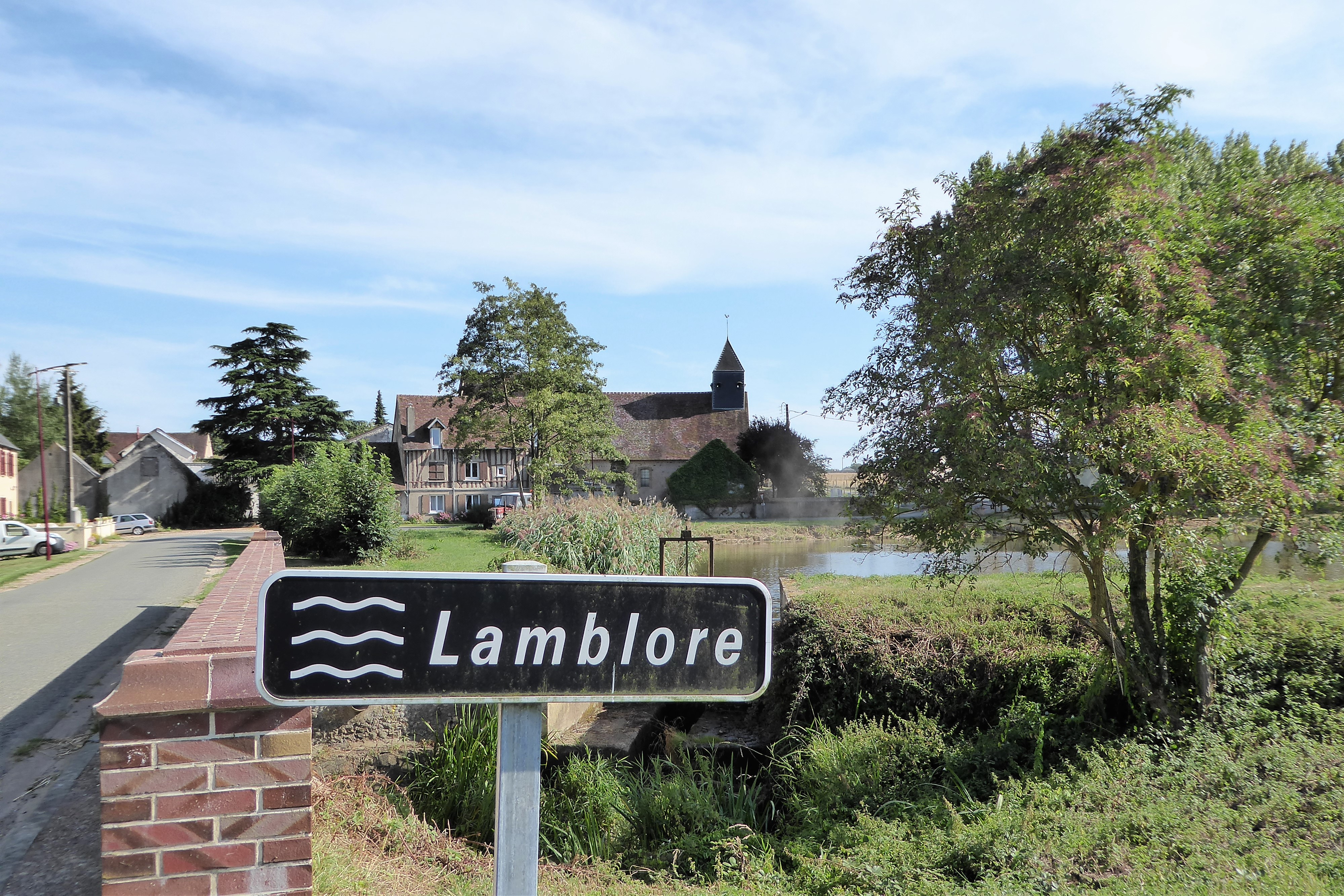 Lamblore : rivière et village du même nom, église Saint-Martin, Eure-et-Loir, France.